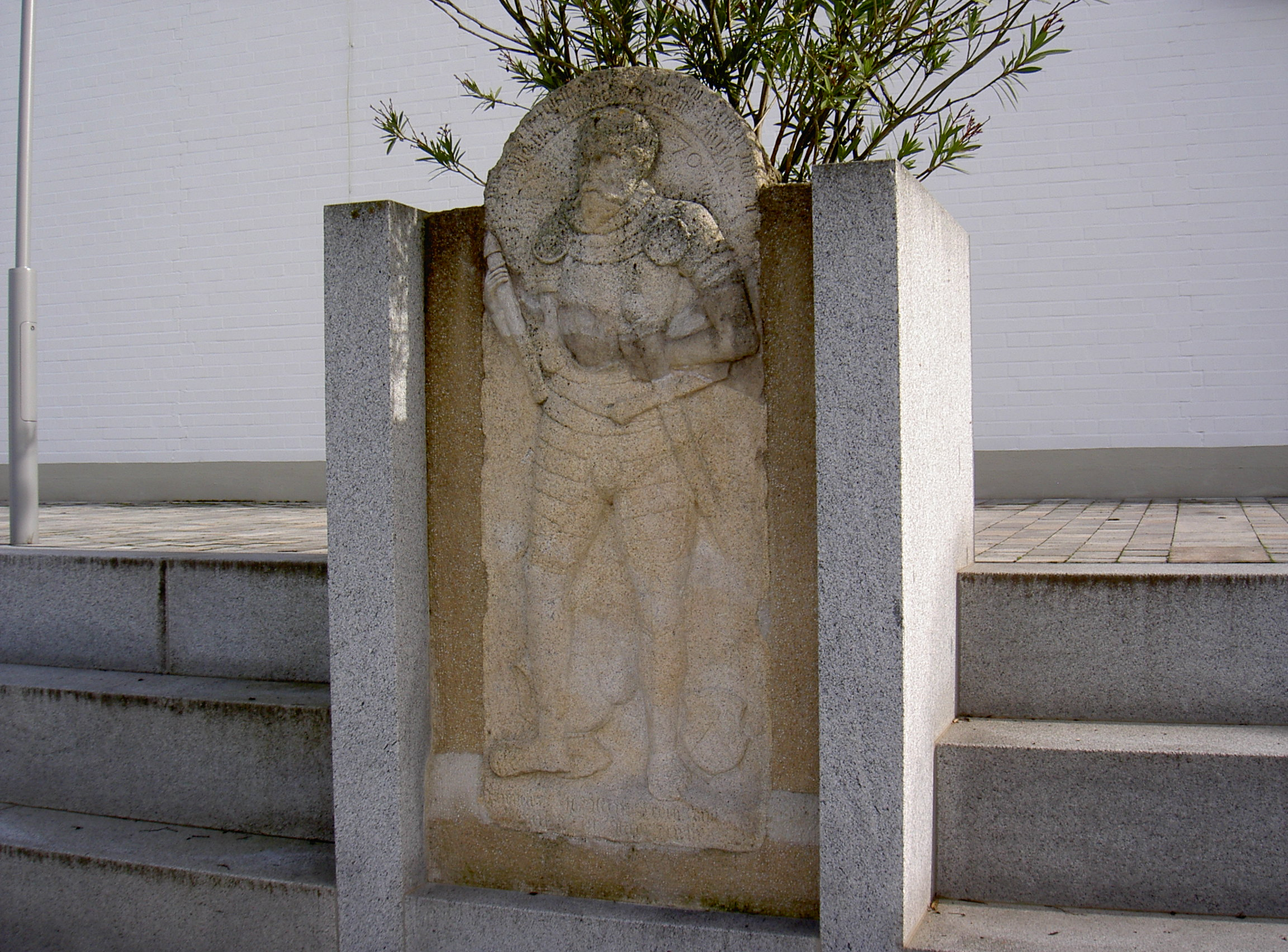 Geigant Epitaph